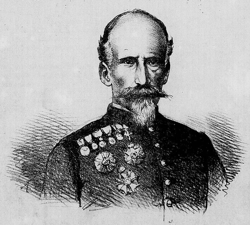 O General Antonio da Silva Paranhos